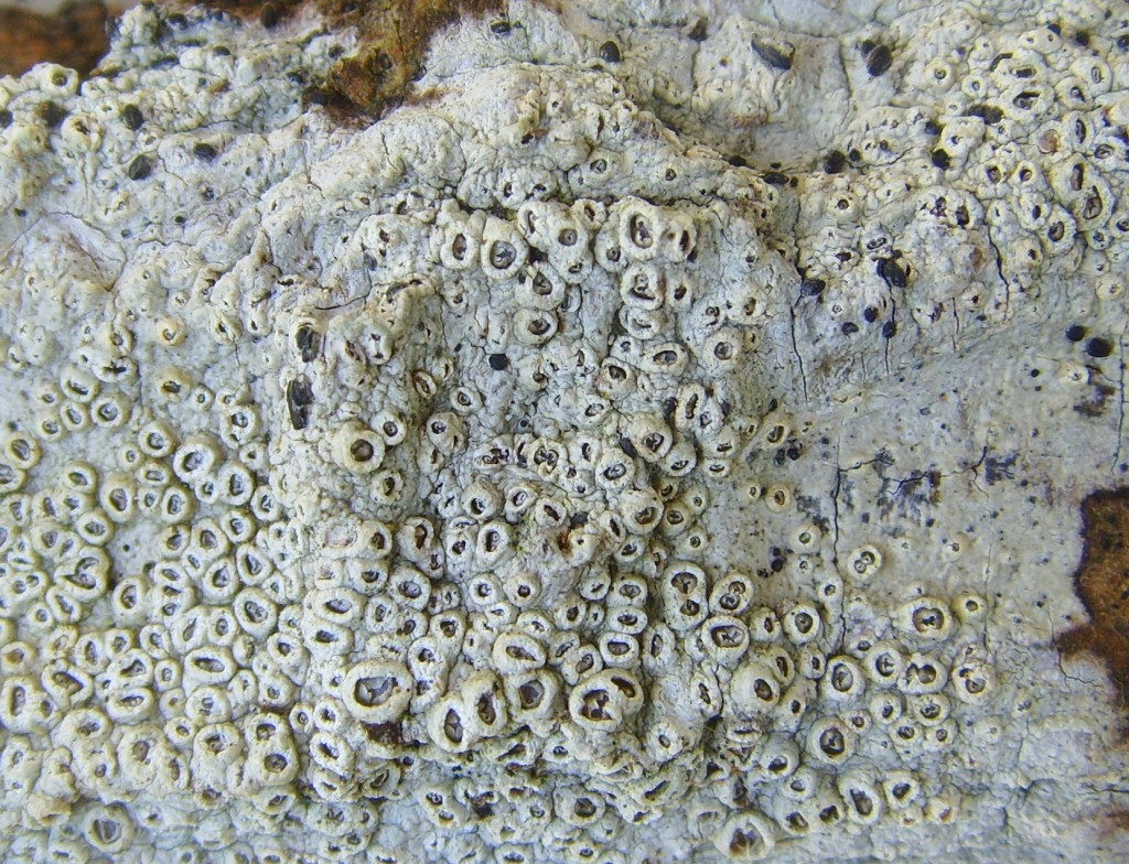 Thelotrema lepadinum, Pt-Grayo,Berné, Morbihan, Bretagne, France